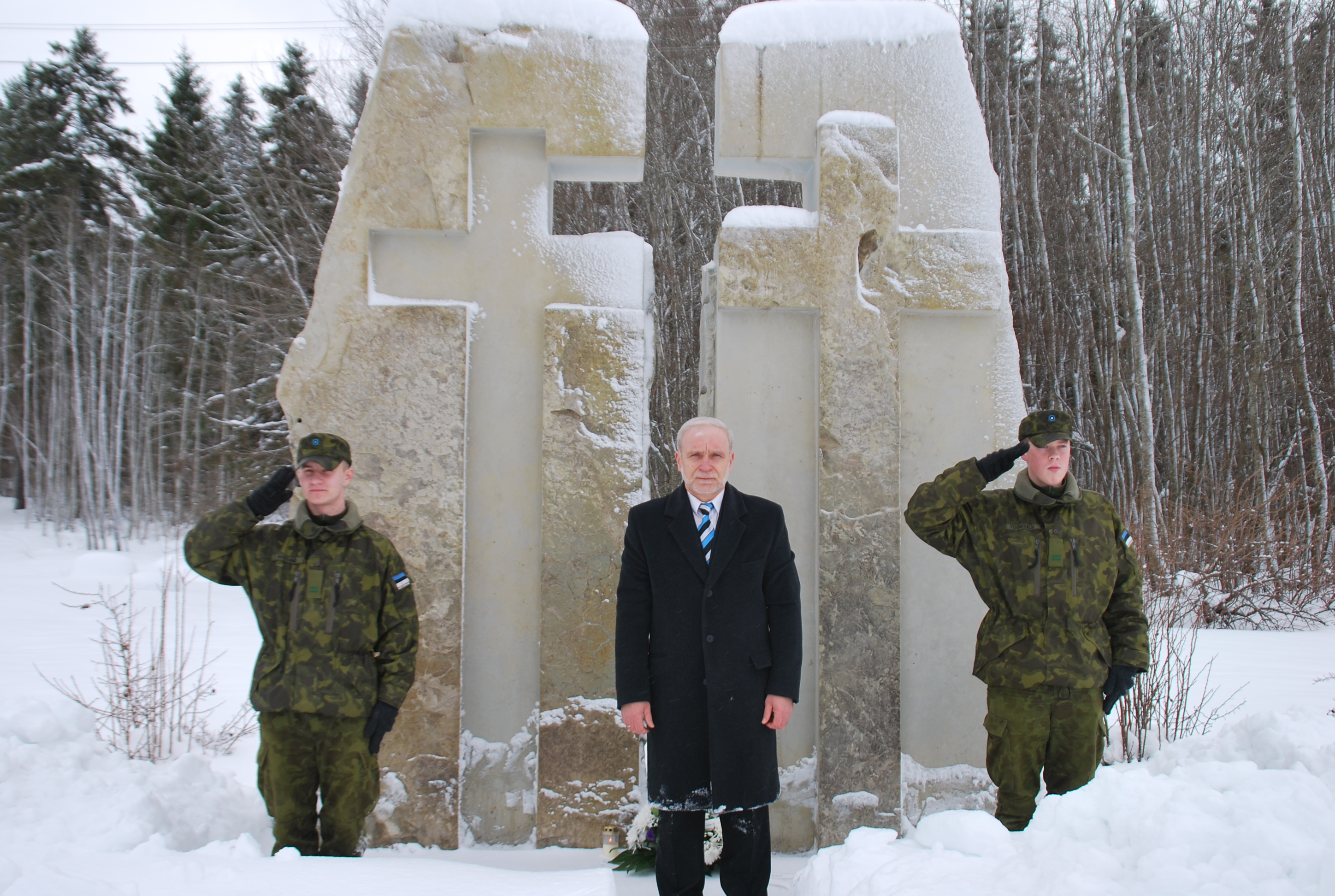 Endine Tamsalu vallavanem Toomas Uudeberg Tamsalu vallas Vistla külas Porkuni lahingu mälestusmärgi juures 24. veebruaril 2012.